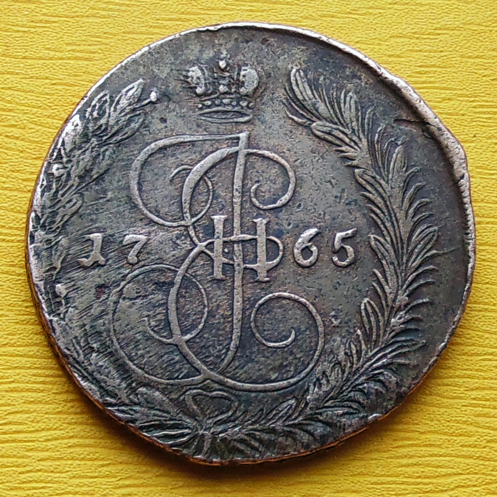 Медный пятак 1765 года, Екатеринбургский монетный двор. Вензель Екатерины Второй ЕII.